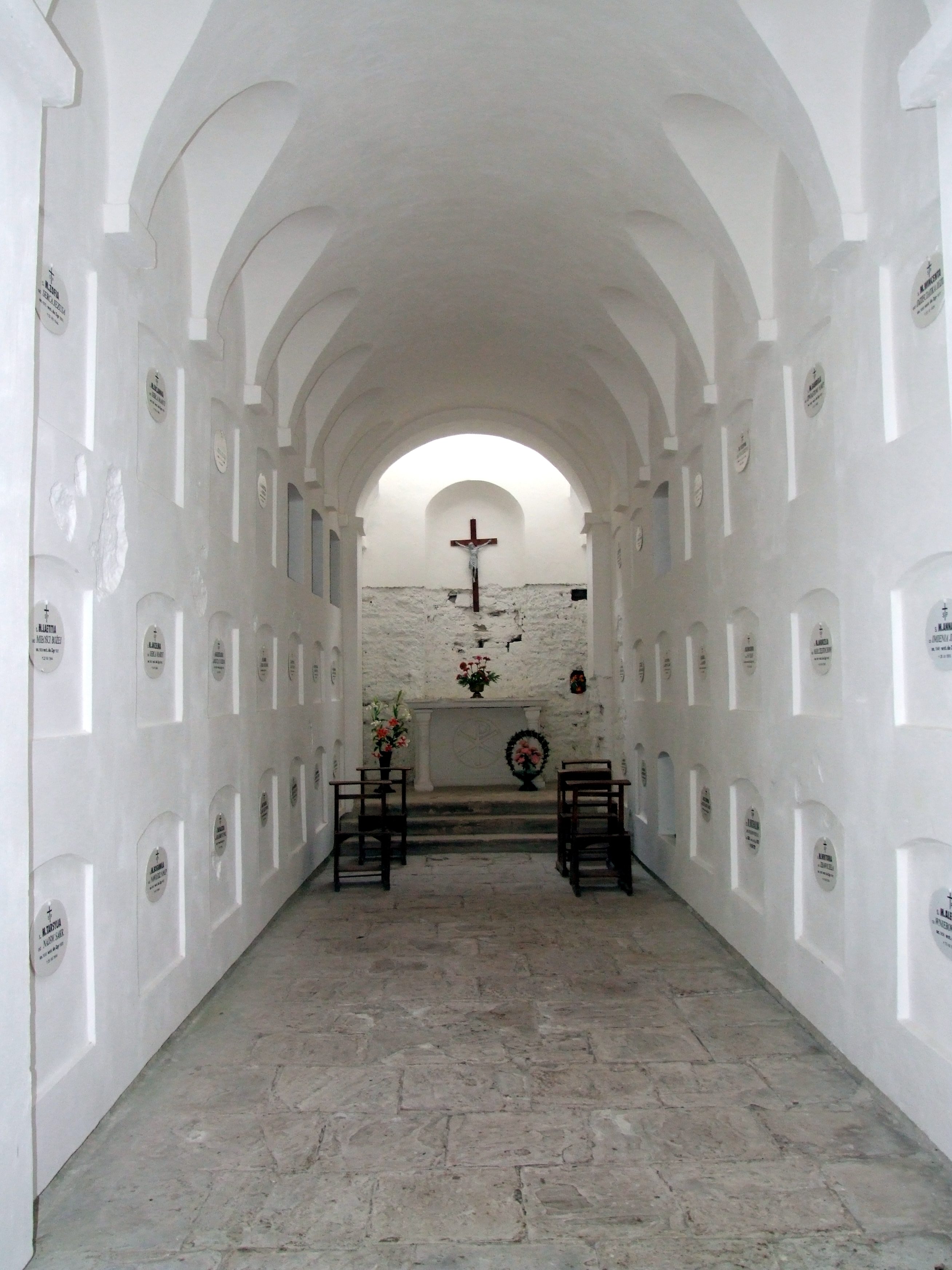 Wnętrze grobowca s.s. niepokalanek od strony wejścia.